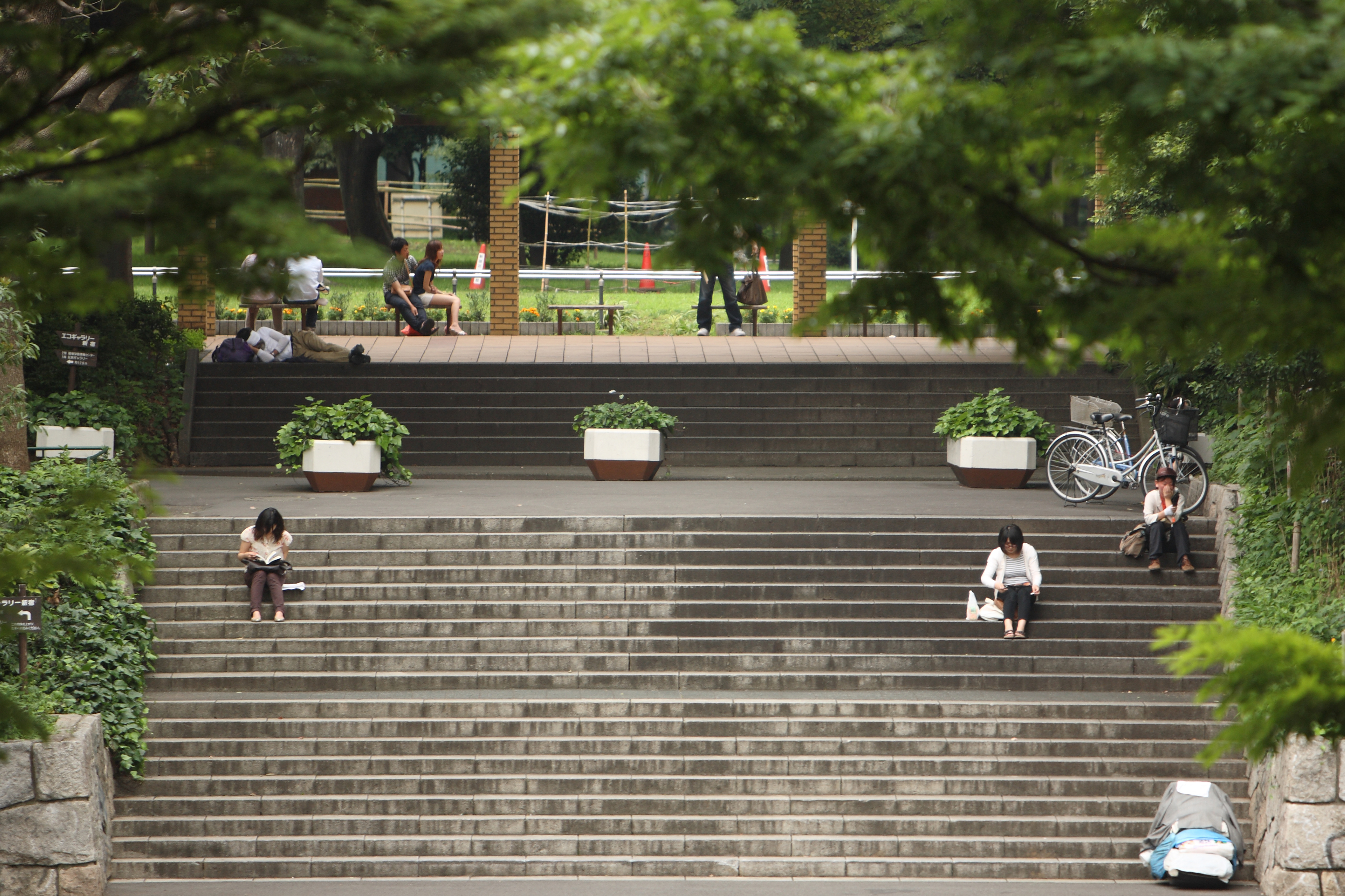 新宿中央公園の階段（東京・新宿区西新宿2-11）